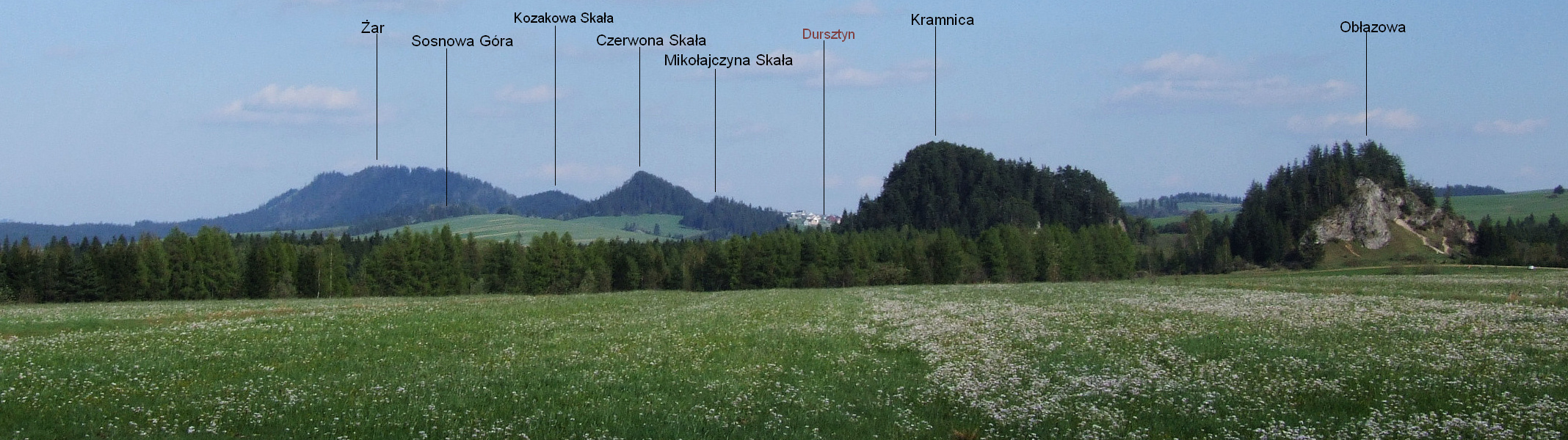 Widok spod Cisowej Skałki